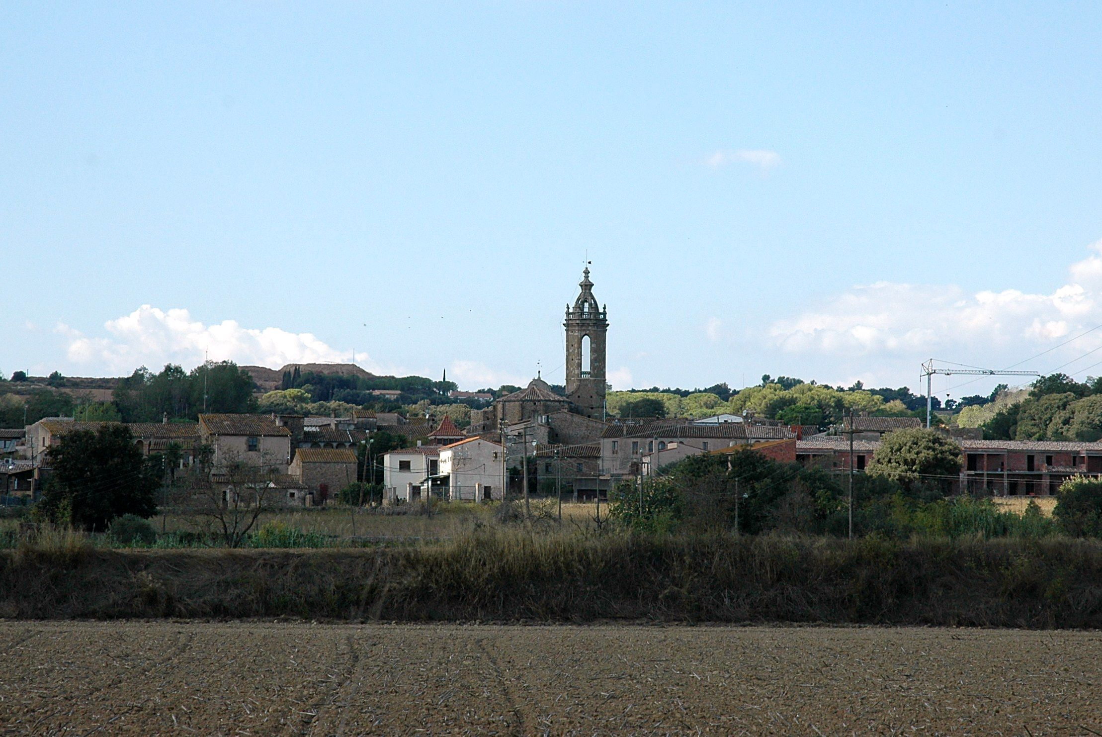 Rupià